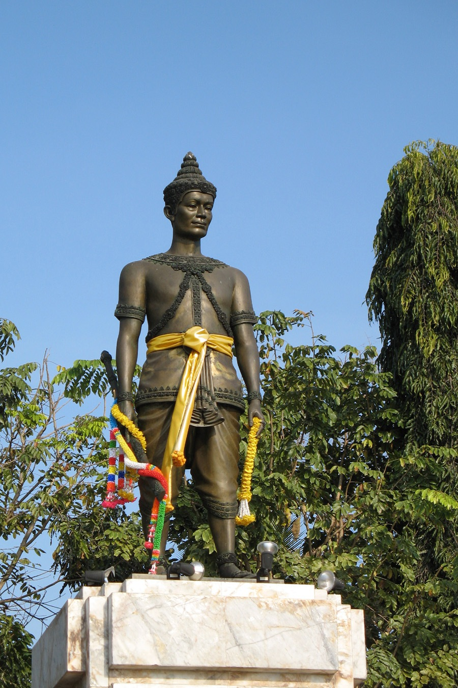 King Ngam Mueang Monument, Phayao Lake.